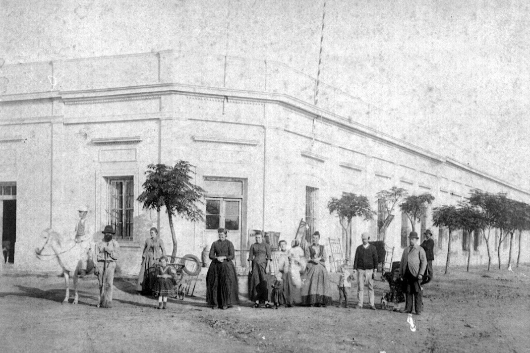 Ilustración de vivienda urbana típica